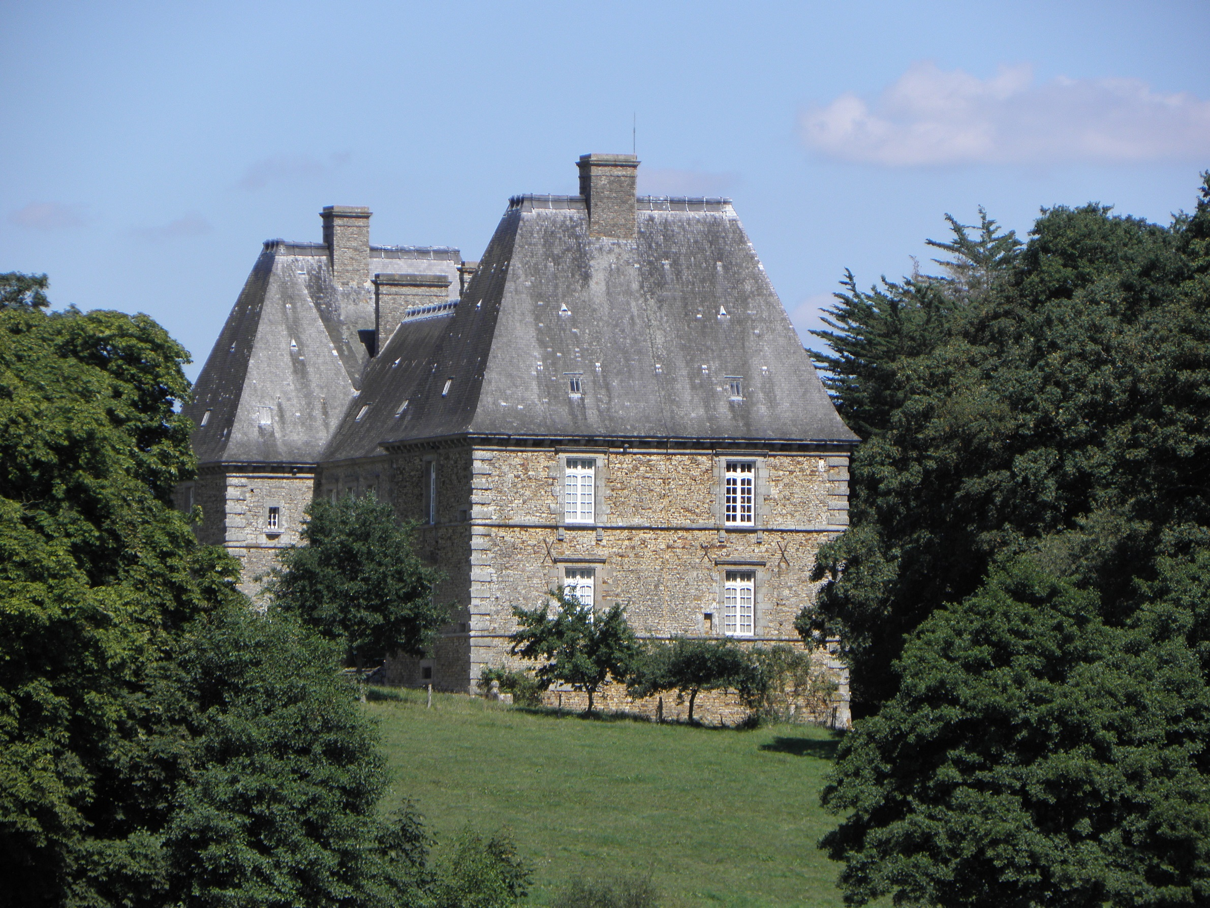 Château de La Magnanne, commune d'Andouillé-Neuville (35).